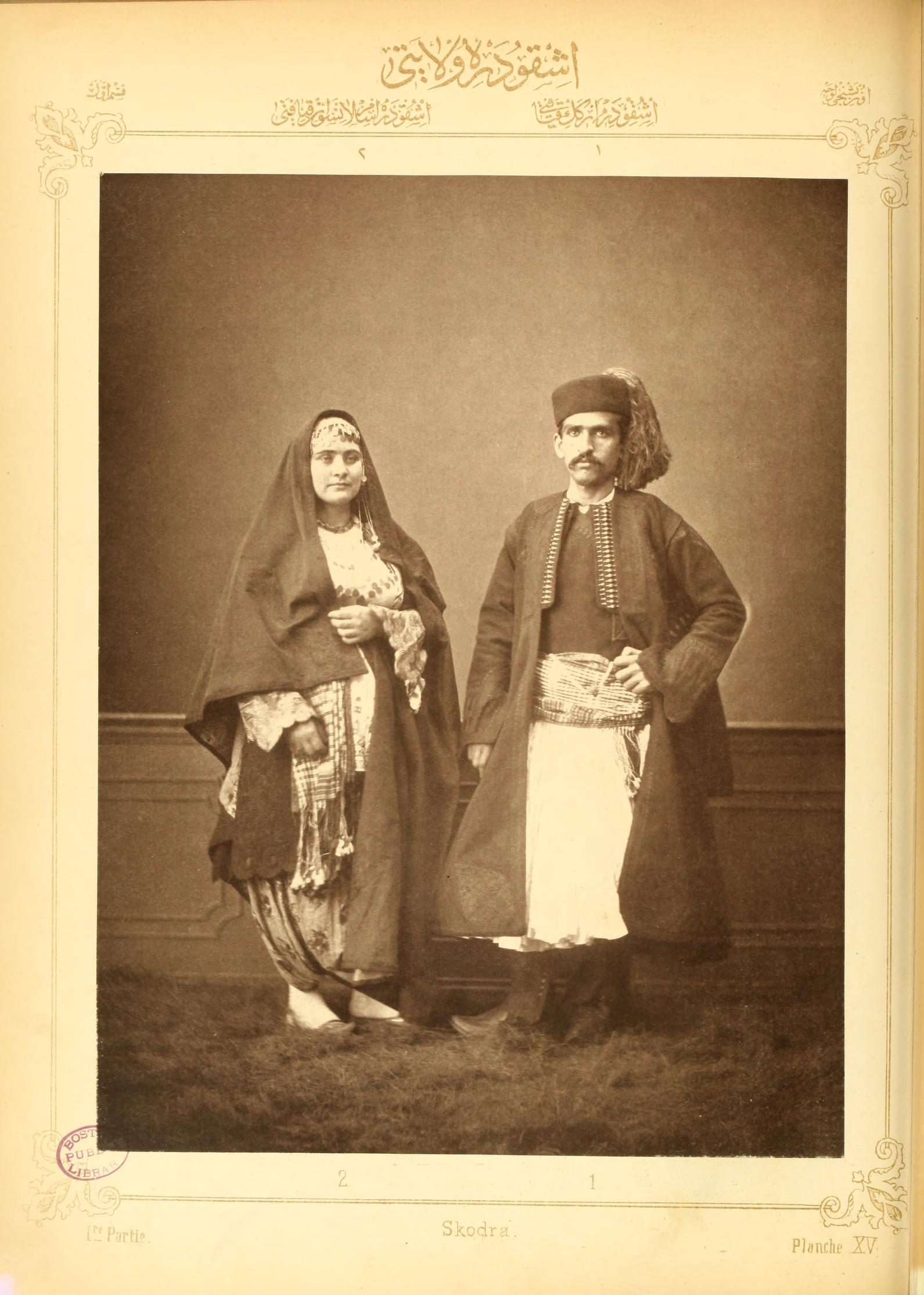 VILAYET DE PRISREN ET SKODRA PLANCHE XV: Musulman de Skodra Dame musulmane de Skodra